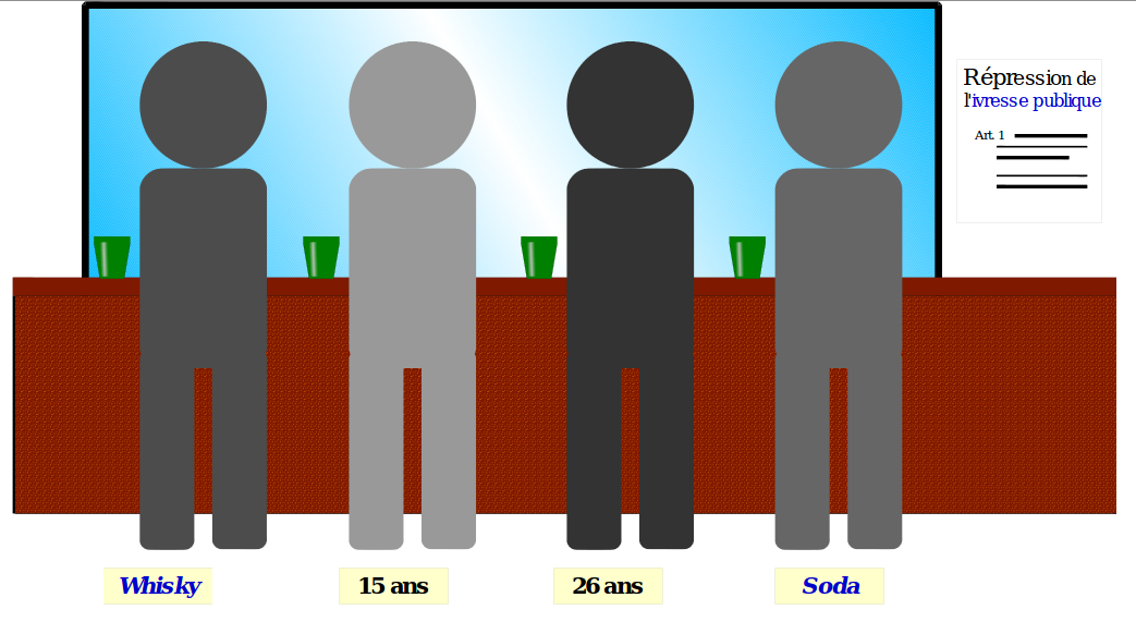 Description Illustration pour Tâche de sélection de Wason#Version_d.C3.A9ontique_de_la_t.C3.A2che_de_Wason Date ici l'adresse web où a été trouvée l'image initialementAuthorRipounet Illustration pour Tâche de sélection de Wason#Version_d.C3.A9ontique_de_la_t.C3.A2che_de_Wason